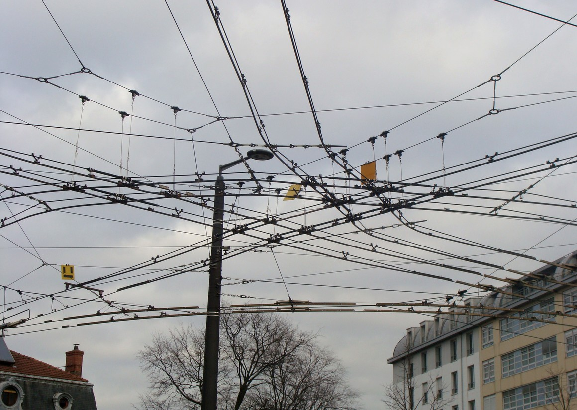 Croisement de lignes aériennes de contact des trolleybus devant la station de Cuire (ligne C1 terminant en boucle, C13 en transit, et raccordement vers le dépôt de Cuire).